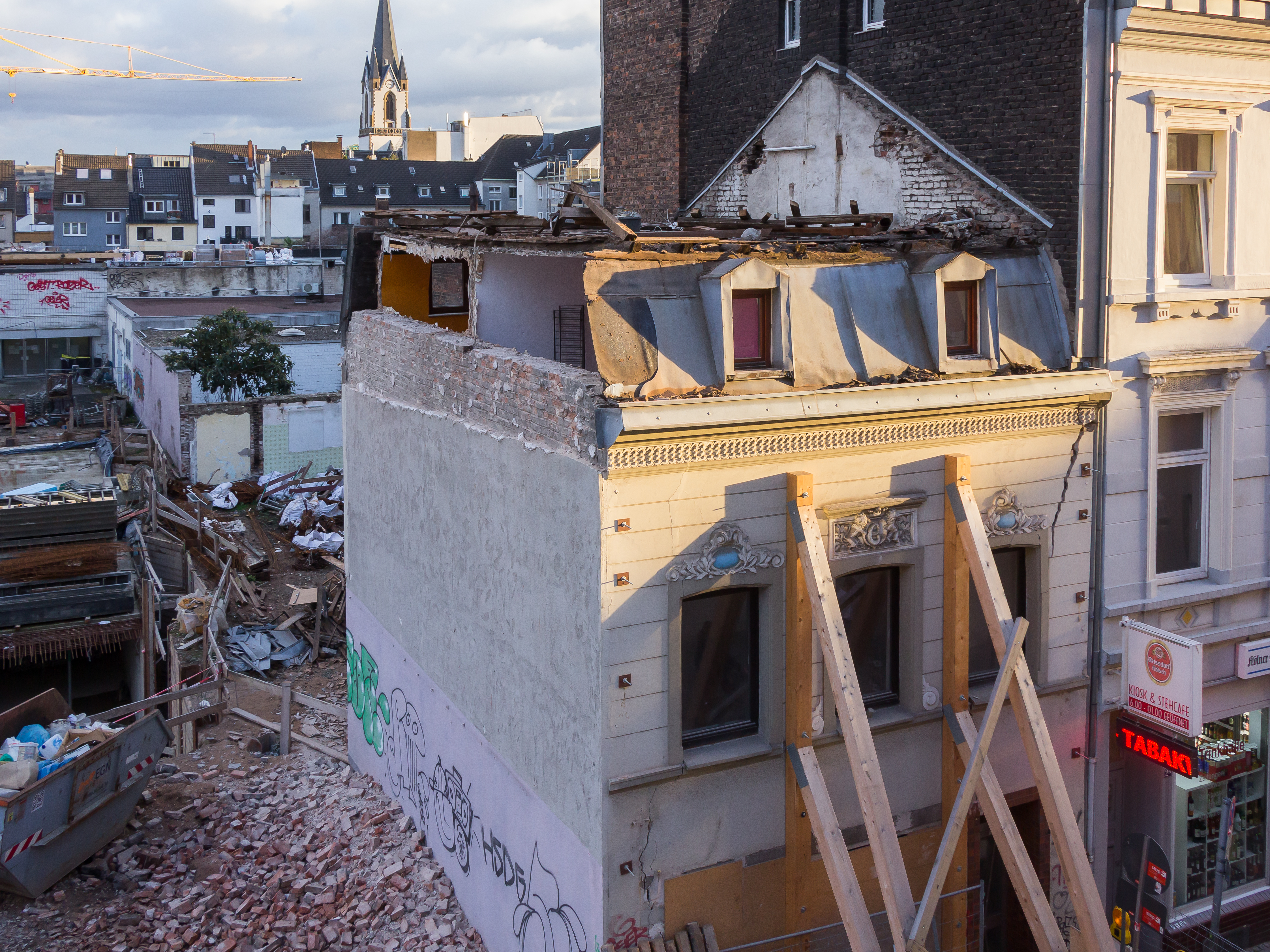 Abbruch des Wohn- und Geschäftshauses Hansemannstraße 2, Köln-Ehrenfeld This is a photograph of an architectural monument.